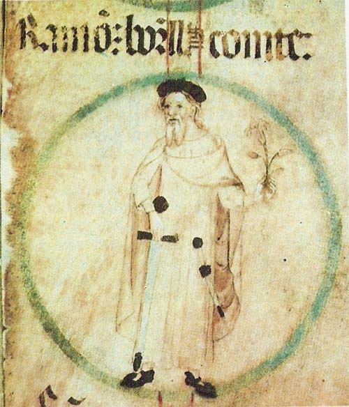 Rotlle genealògic del Monestir de Poblet